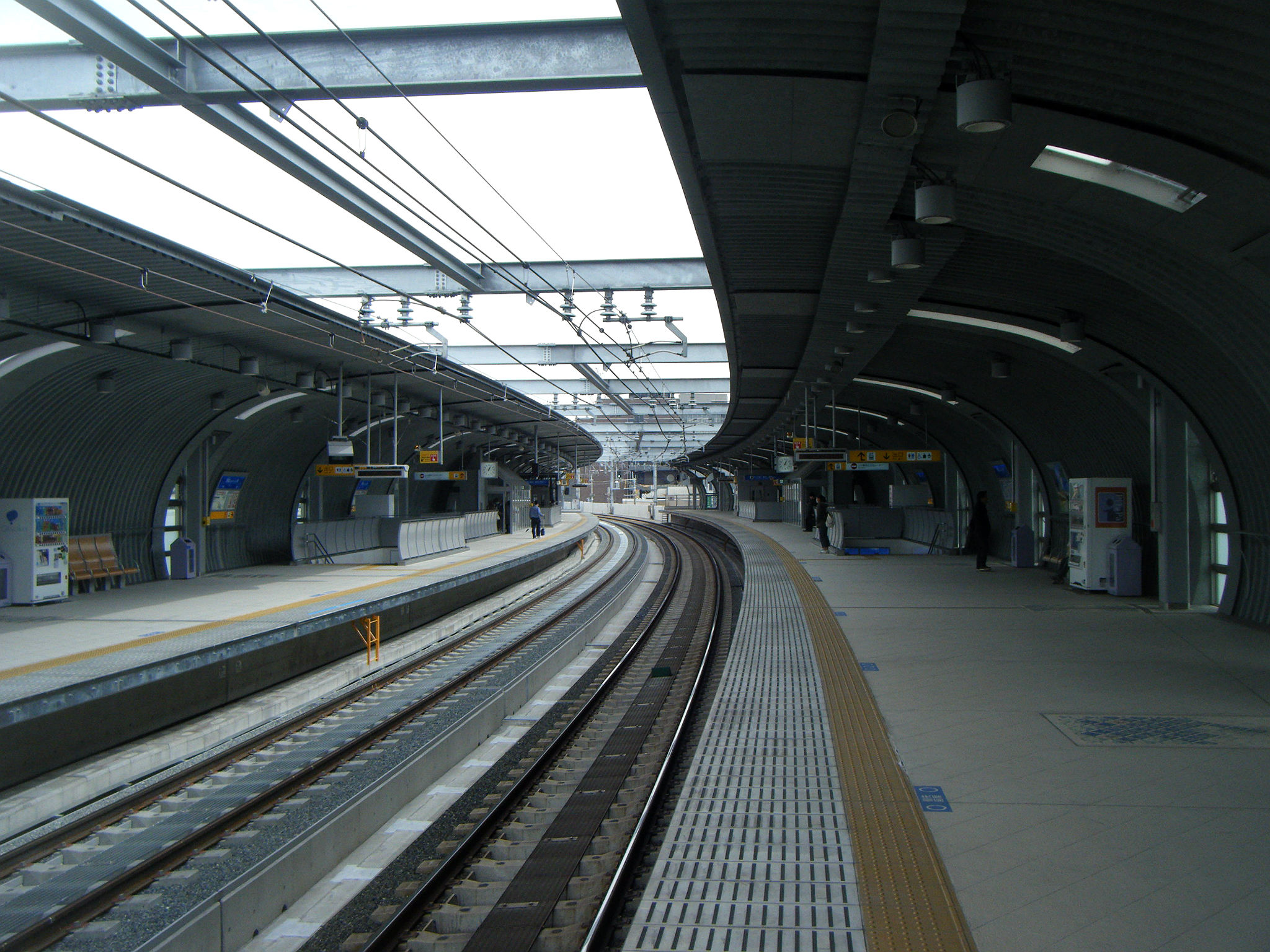 阪神鳴尾駅ホーム 上り線高架化初日